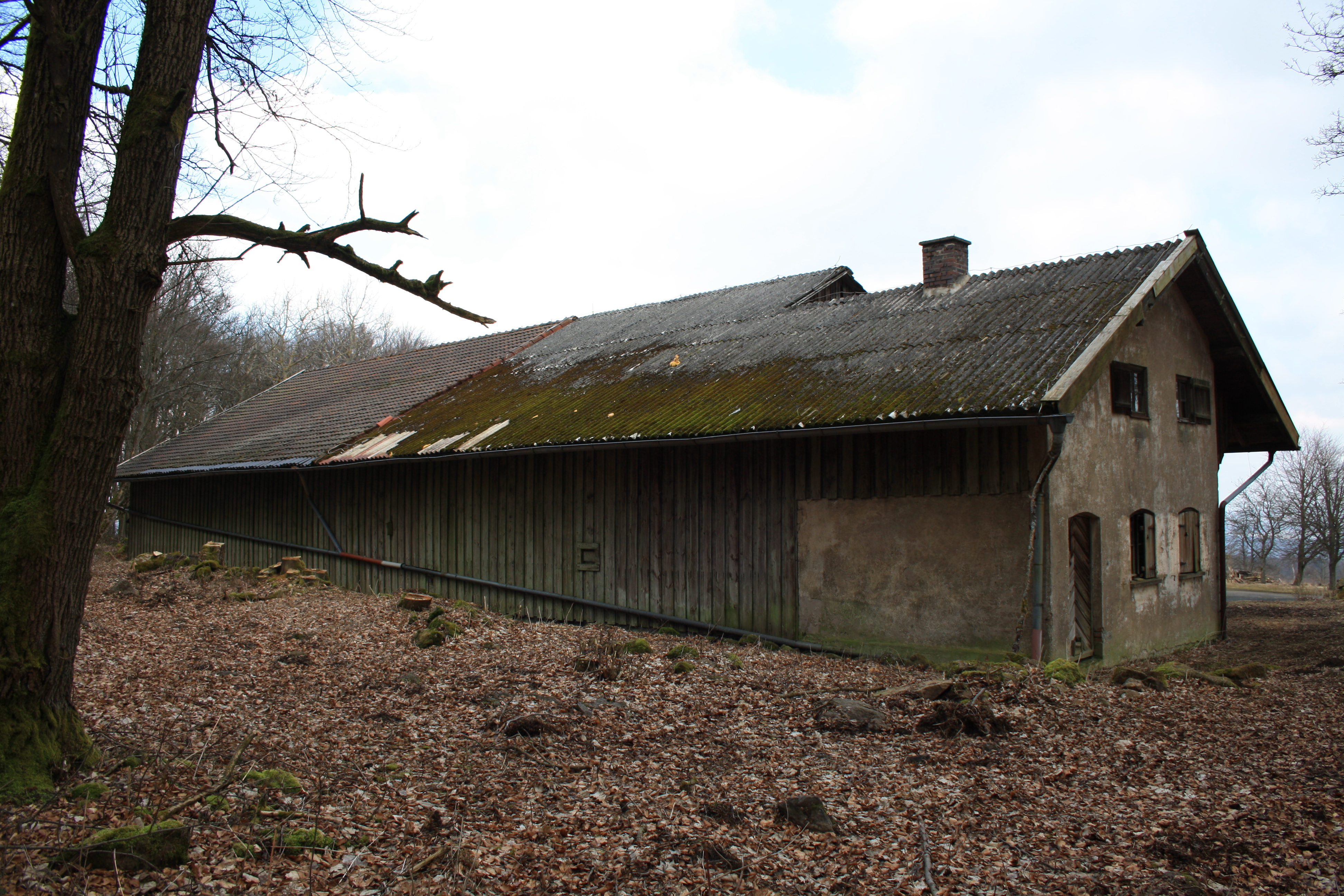 Rhönhof